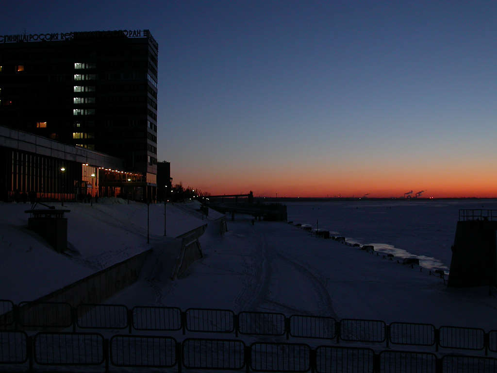 Samara